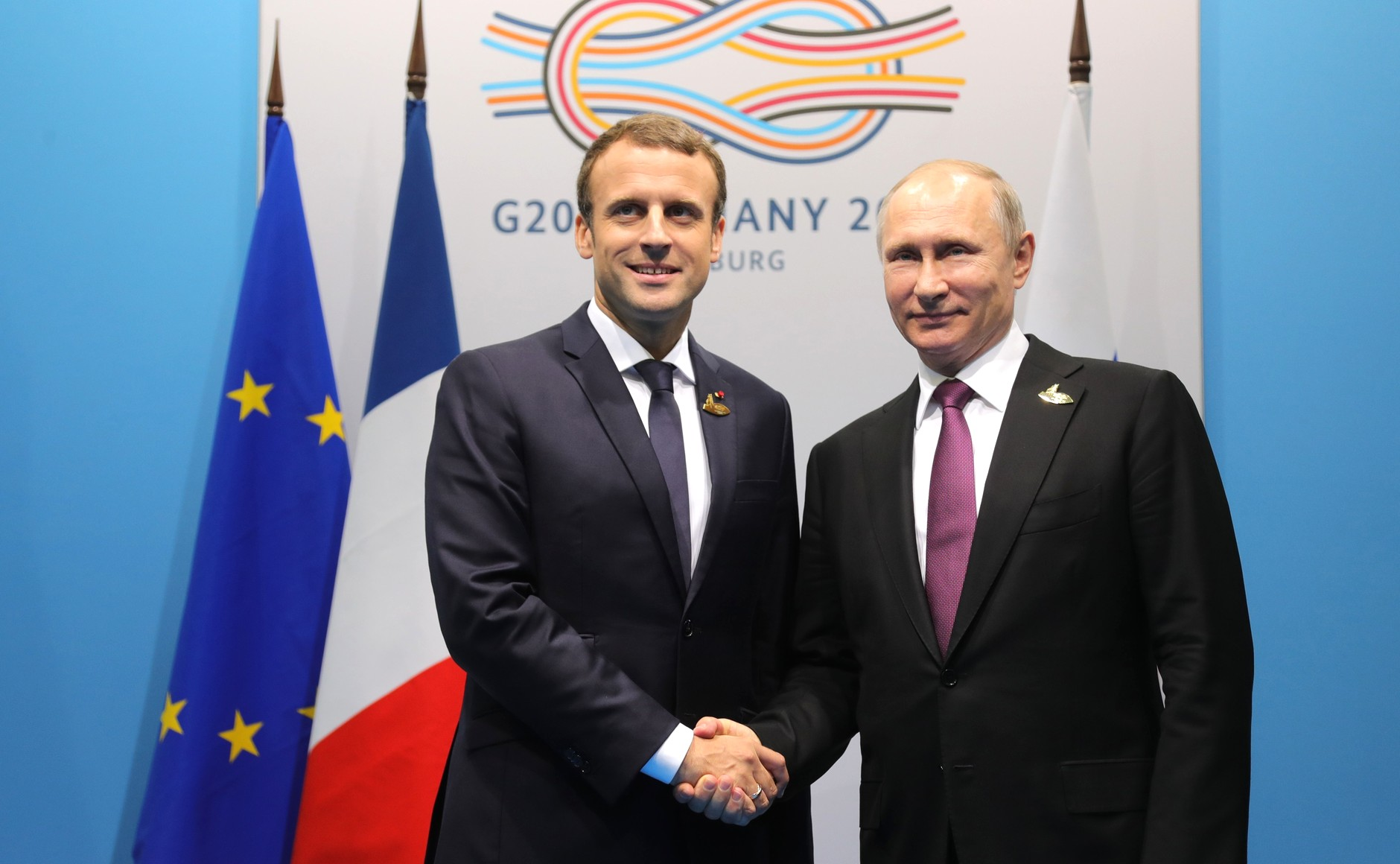 Встреча Президента России Владимира Путина с Президентом Франции Эммануэлем Макроном на полях саммита «Группы двадцати»